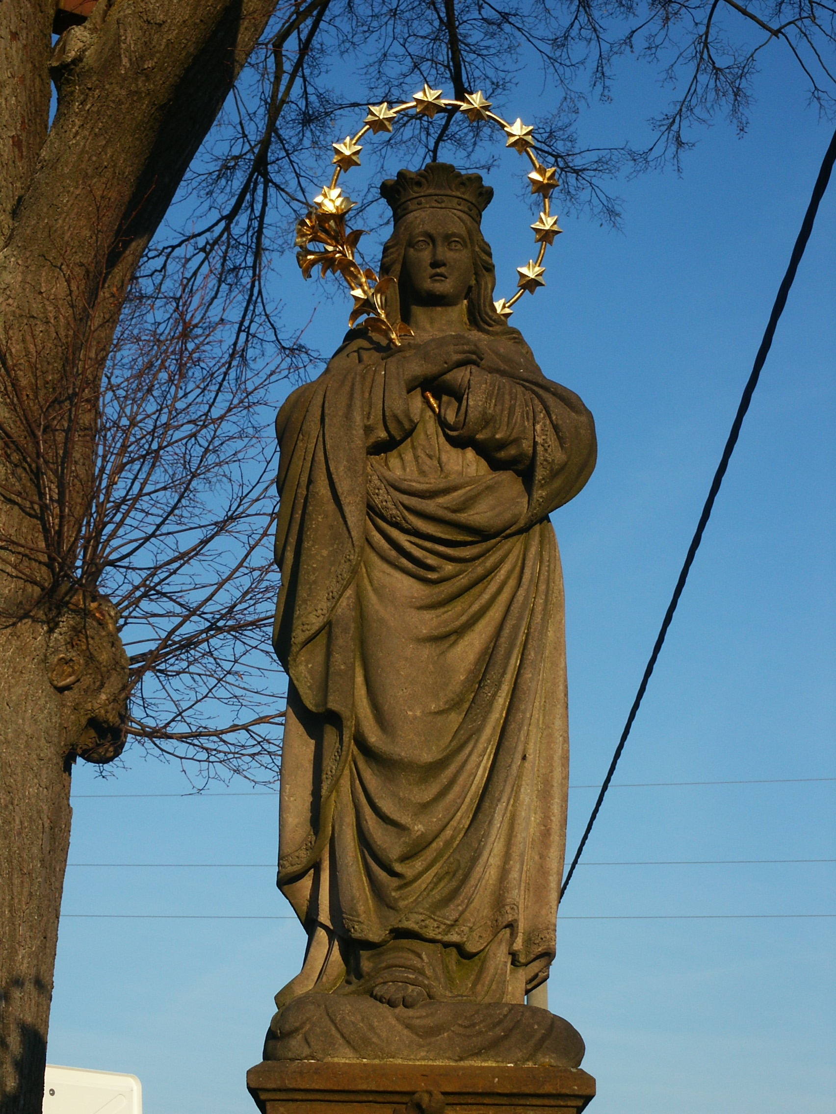 Nedaříž - socha Panny Marie